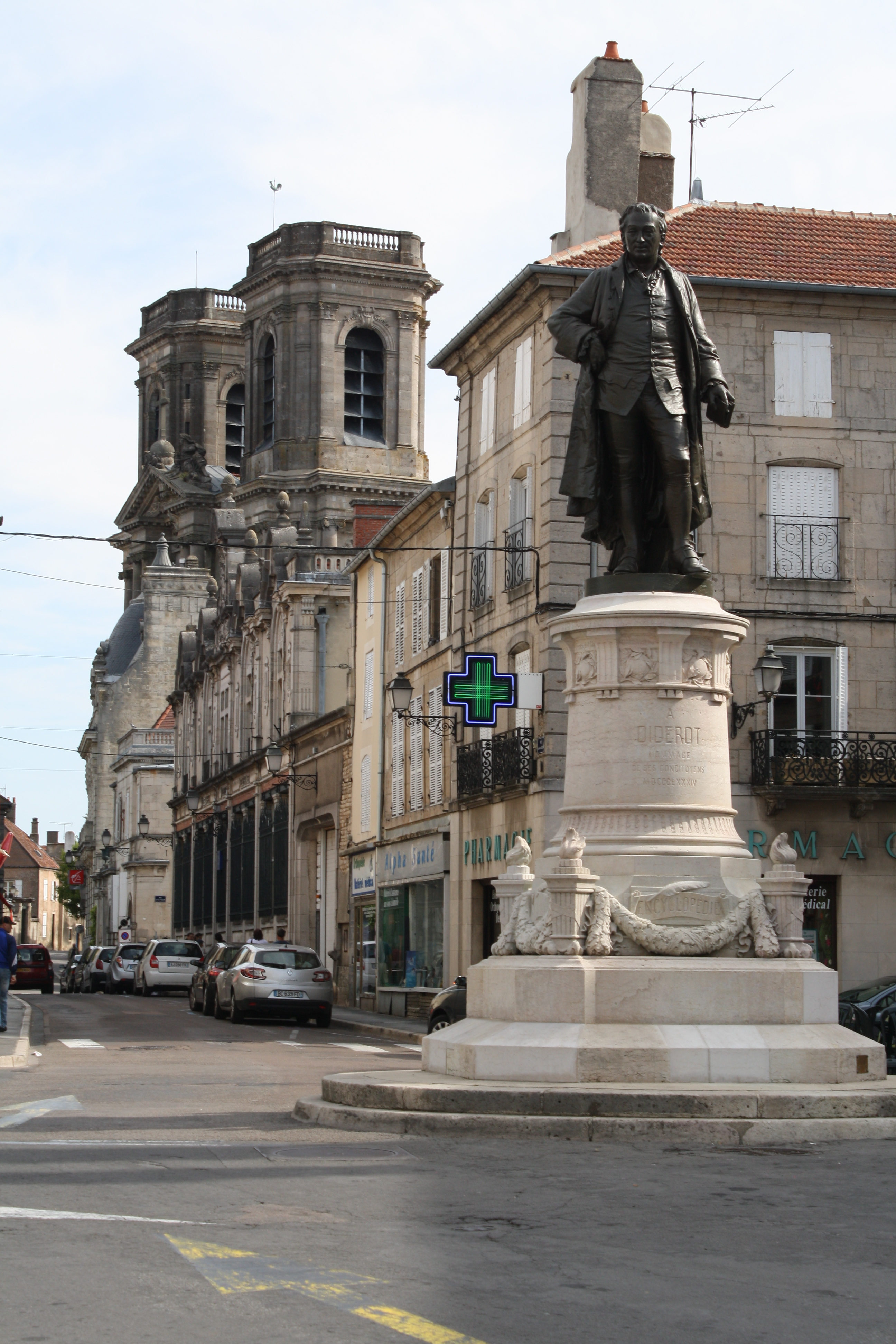 Statue de Diderot à Langres, département de la Haute-Marne, France, ville de Naissance de Denis Diderot, Champagne-Ardenneau. Sur cette place, non visible sur la photo, au n°9, la maison où Diderot est né.